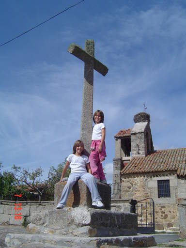 Villar de Corneja, province of Ávila, Spain